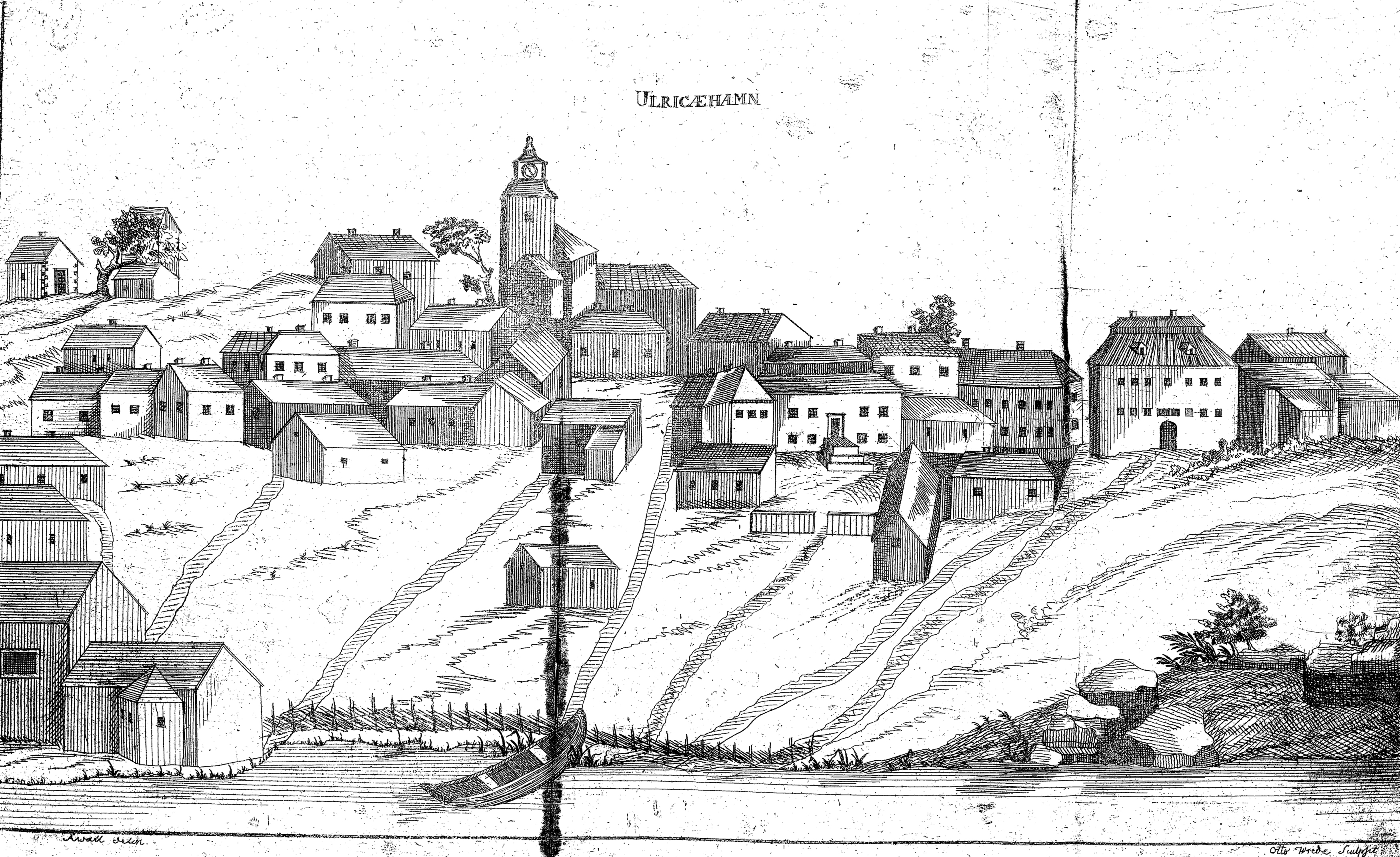 Ulricehamn avbildat år 1782 i Disertatio de Ulricehamn. På bilden syns kyrkan, de äldre rådhuset och flera av de gårdar som brann upp vid statsbranden 1788.